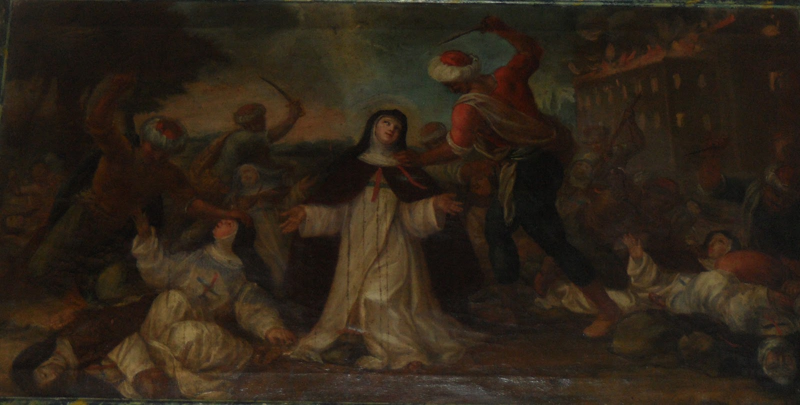 Colección del Monasterio de Monjas Trinitarias de Madrid